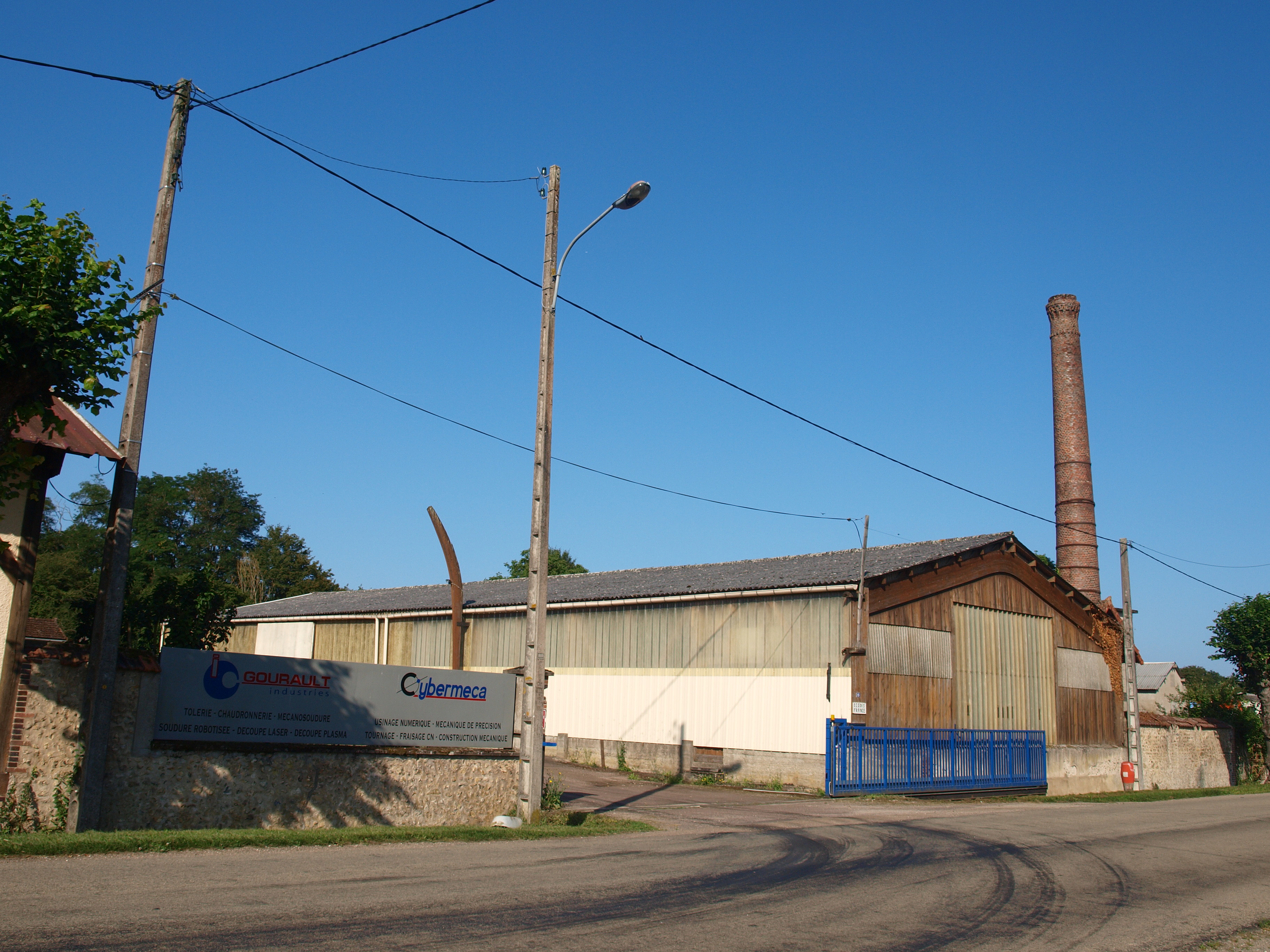 Saint-Fargeau (Yonne, France)